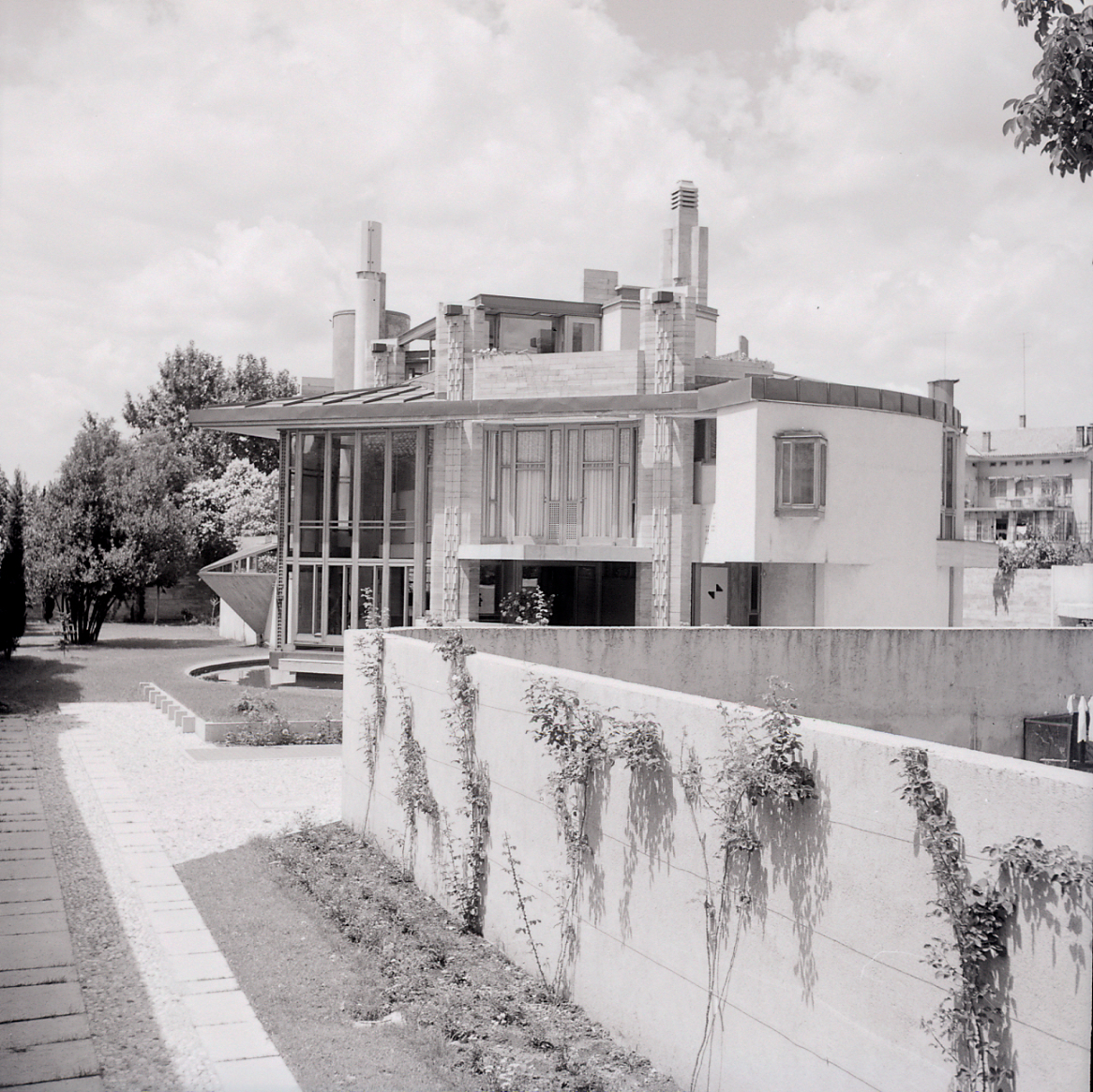 Servizio fotografico : Udine, 1961 / Paolo Monti. - Buste: 6, Fototipi: 6 : Negativo b/n, gelatina bromuro d'argento/ pellicola ; 6x6. - ((Serie costituita da 6 negativi identificati con i nn.: 16668-16673. Numerazione parallela: 101, 103, 127, 138-140. La suddetta serie è contenuta nella scatola identificata con la numerazione R16657-17048.